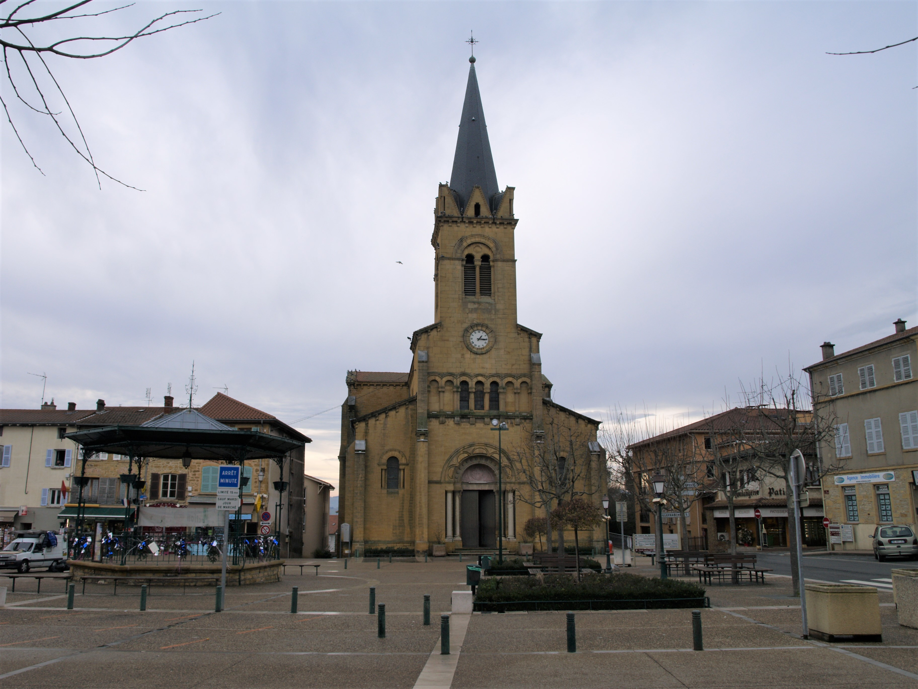 Photographie de la place de la libération à Le Bois-d'Oingt